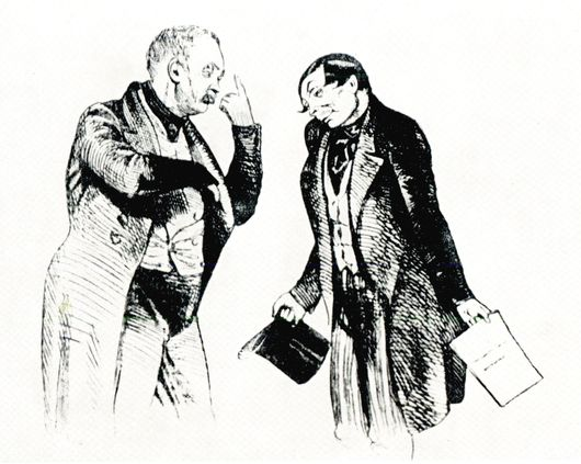 Иллюстрация П. А. Федотова к рассказу Ф. М. Достоевского "Ползунков"